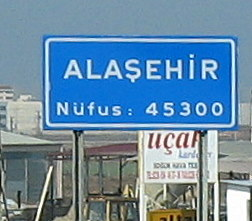 Alaşehir, Manisa tabelasi